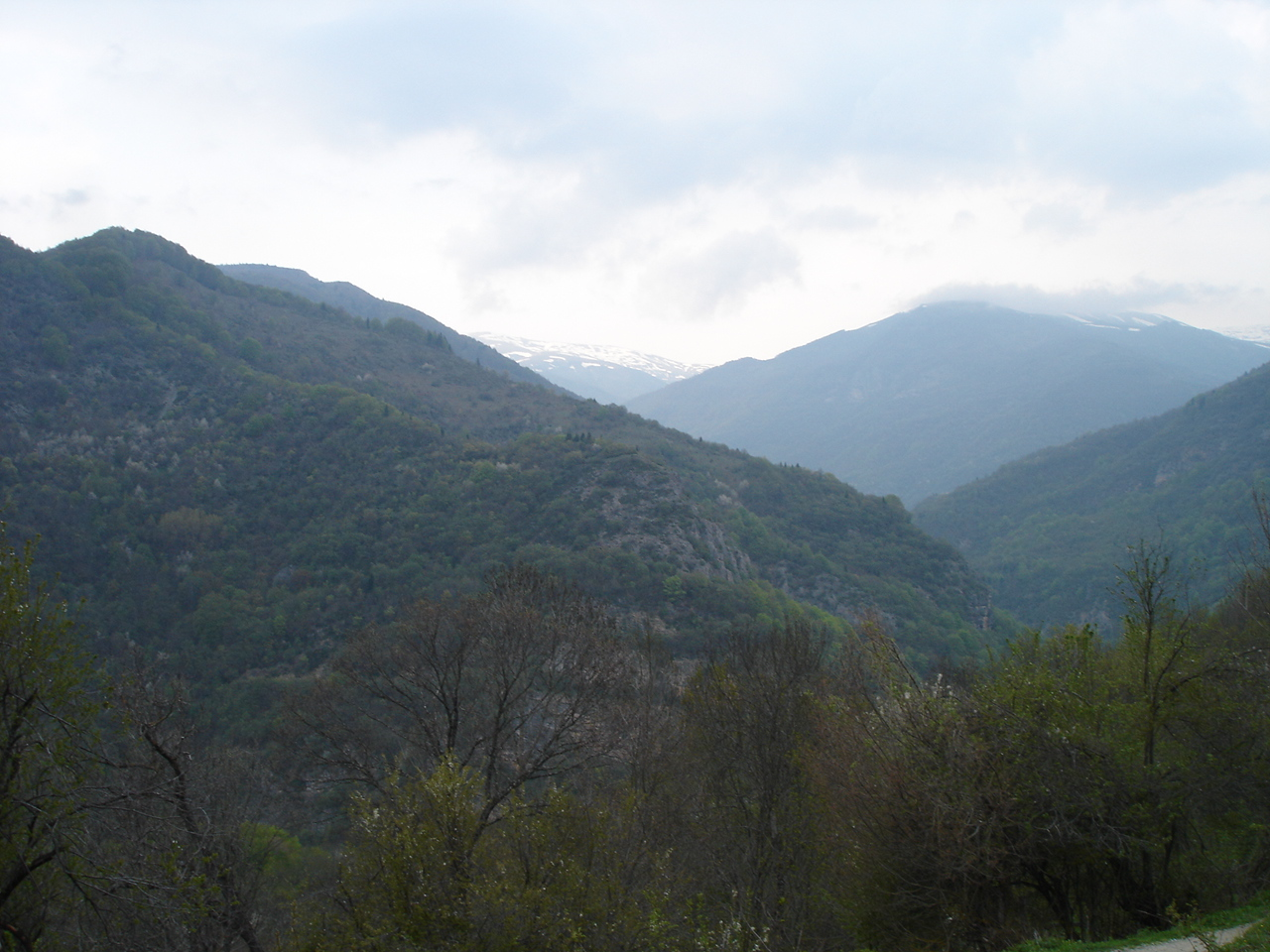 Поглед од селото Волковија кон планината Кораб и реката Радика.